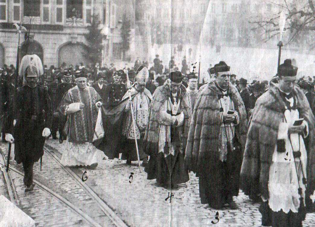 Bildunterschrift: Freiburger Chorherren in ihren Almutien bei der Weihe von Bischof André Bovet 1912 (Freiburg im Üechtland, Schweiz). 1512 erlaubte Papst Julius II. den Freiburgern die Errichtung eines Kapitels, bestehend aus Propst (Vorsteher), Dekan, Kantor und 12 Chorherren. Die Chorherren waren zudem berechtigt, die Almutie zu tragen. Im Vordergrund Chorherren mit Almutien aus Fehrückenfell.